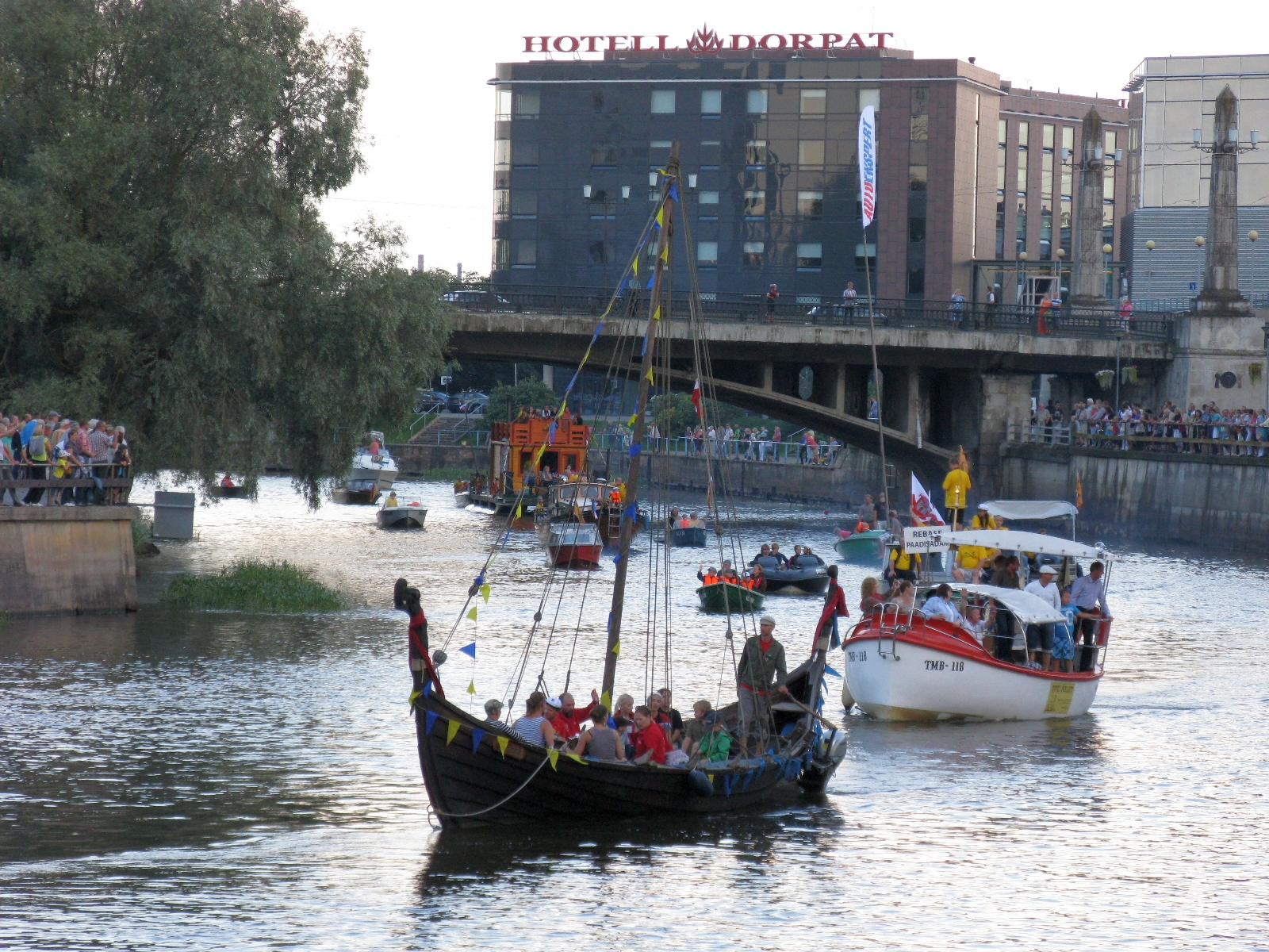 Jõeparaad Emajõe festivalil, esiplaanil viikingilaev ja Rebase paadisadama esindus, 18. august 2012